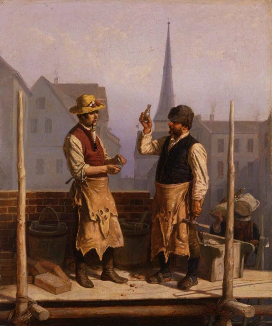 Theordor Hosemann, Maurer beim Bau des Berliner Rathauses, Ölgemälde 1861, Stiftung Stadtmuseum Berlin